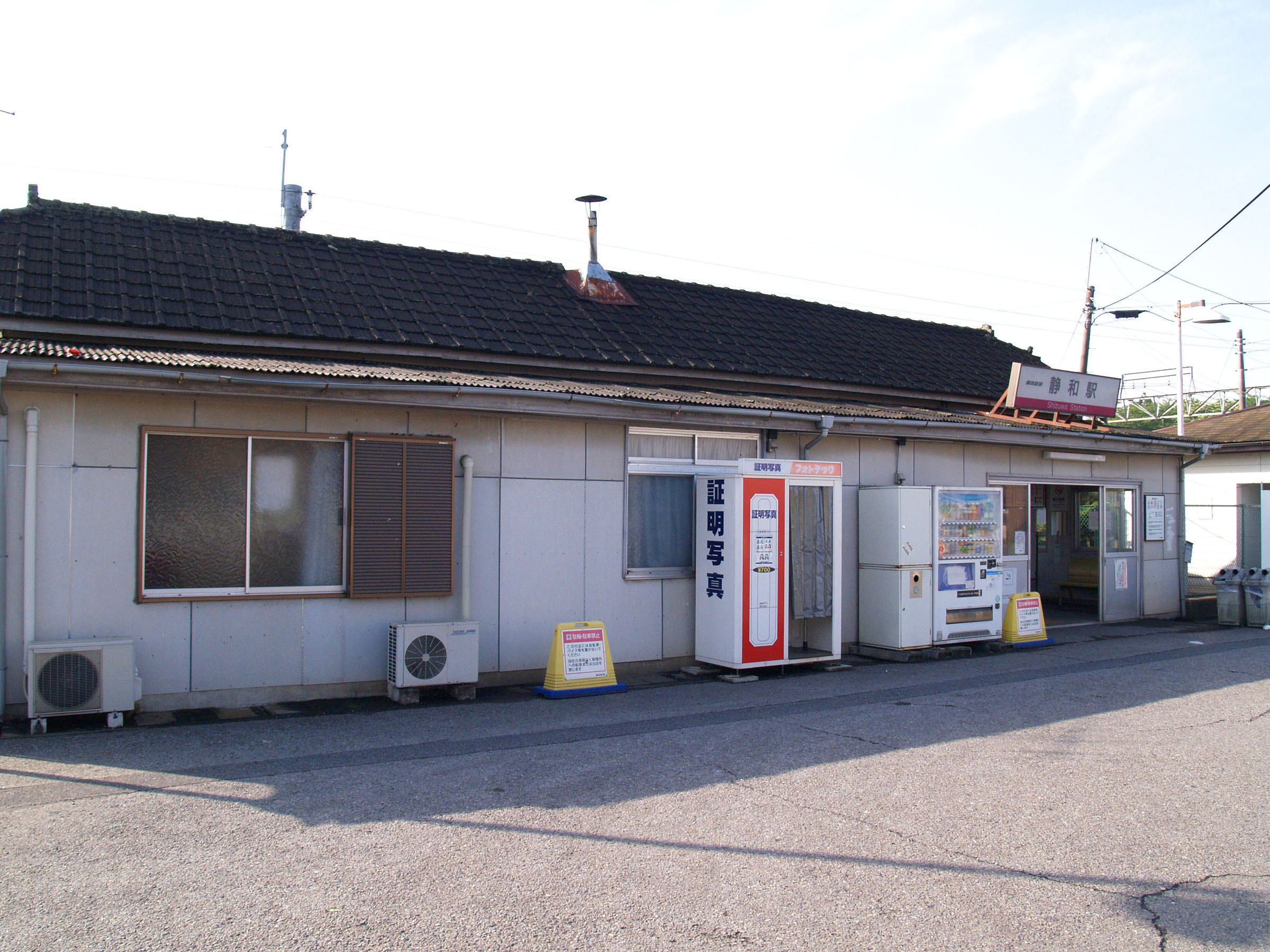 静和駅駅舎